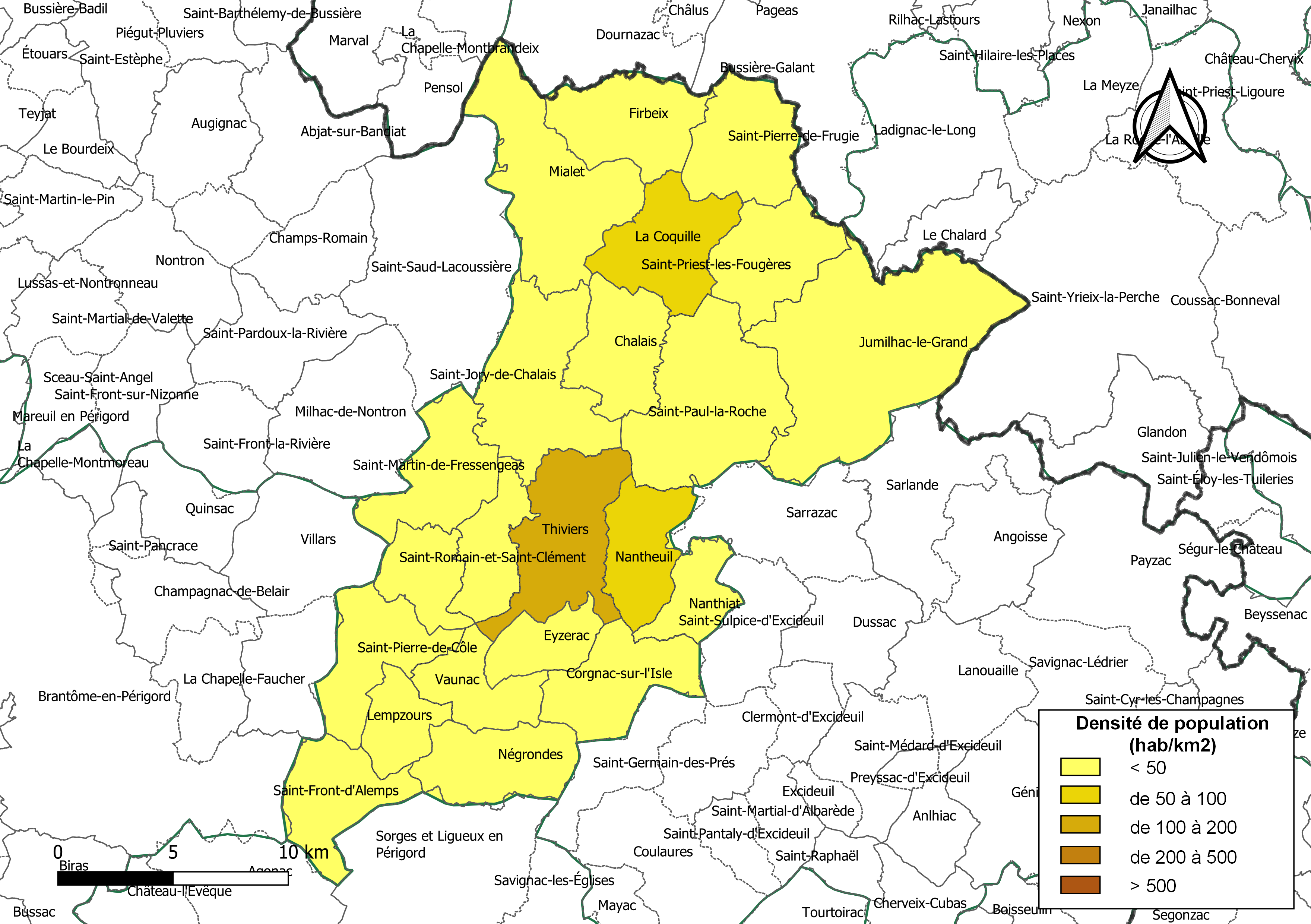 Carte des densités de population (millésimée 2016) des communes de la communauté de communes la Communauté de communes Périgord-Limousin, département de la Dordogne, France. Composition au 1er janvier 2019.